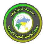 اللوجو الخاص بالمعهد